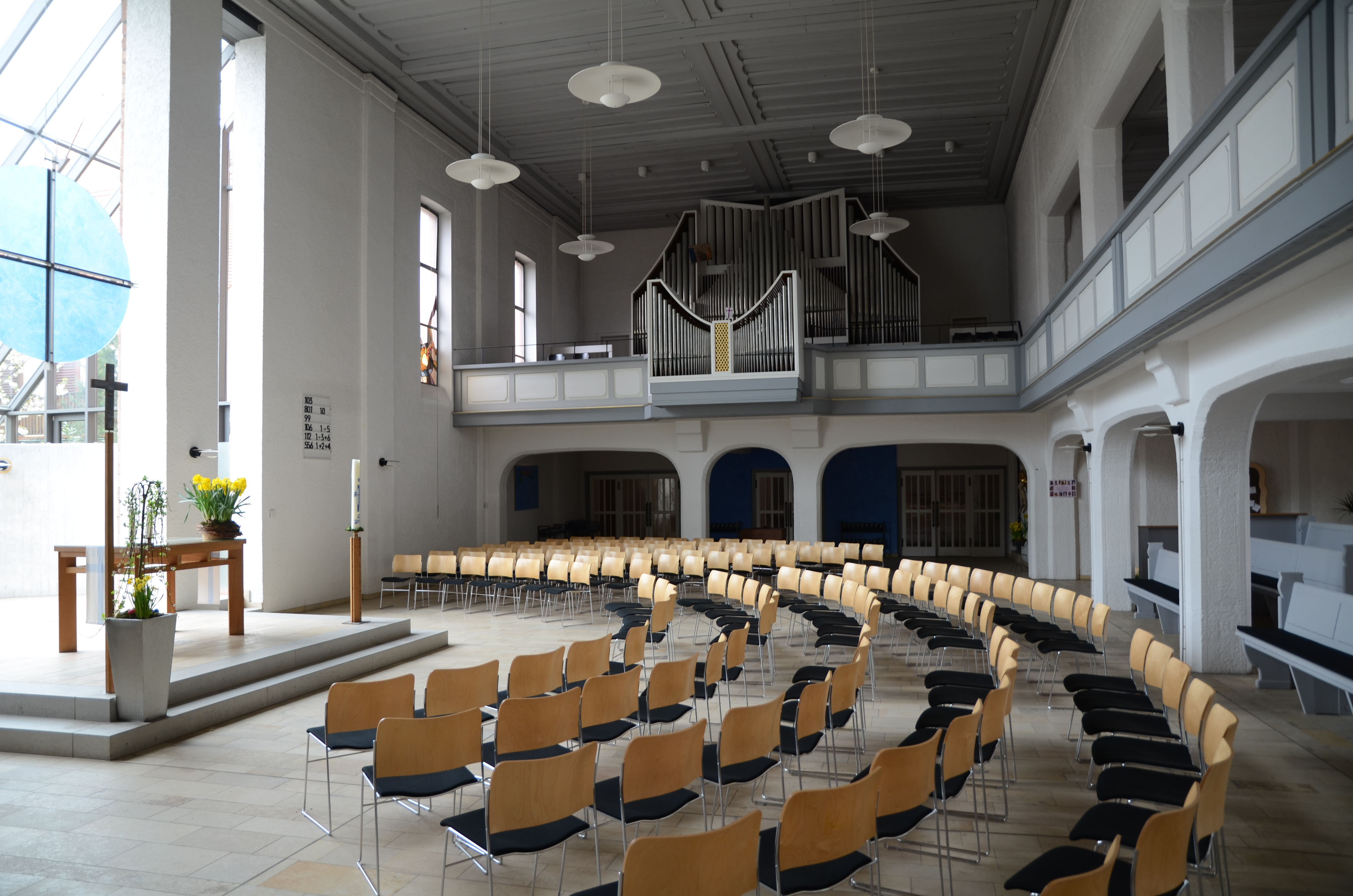 evang.-luth. Christuskirche in Aschaffenburg